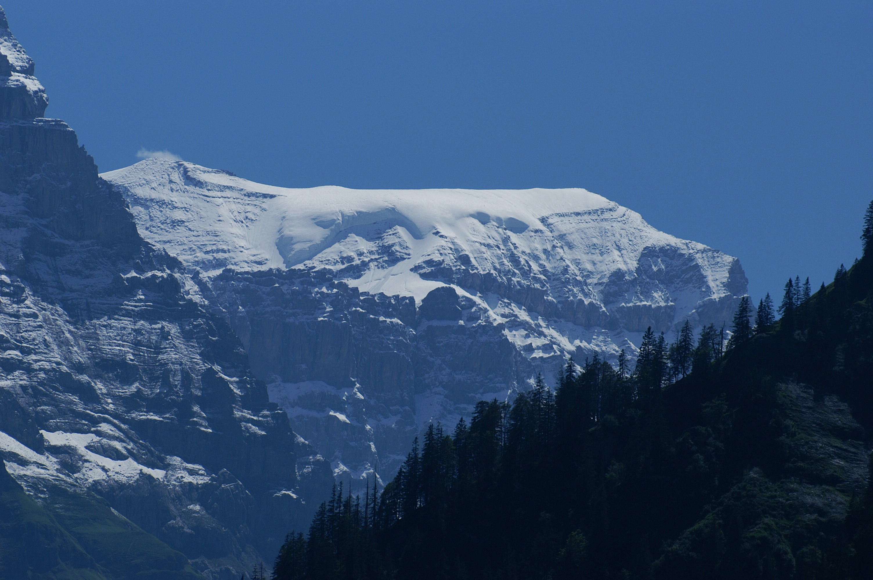 Blick von der Klausenpaßstraße auf den Bifertenstock, der ein 3'421 m ü. M. hoher Gipfel in den Glarner Alpen ist.